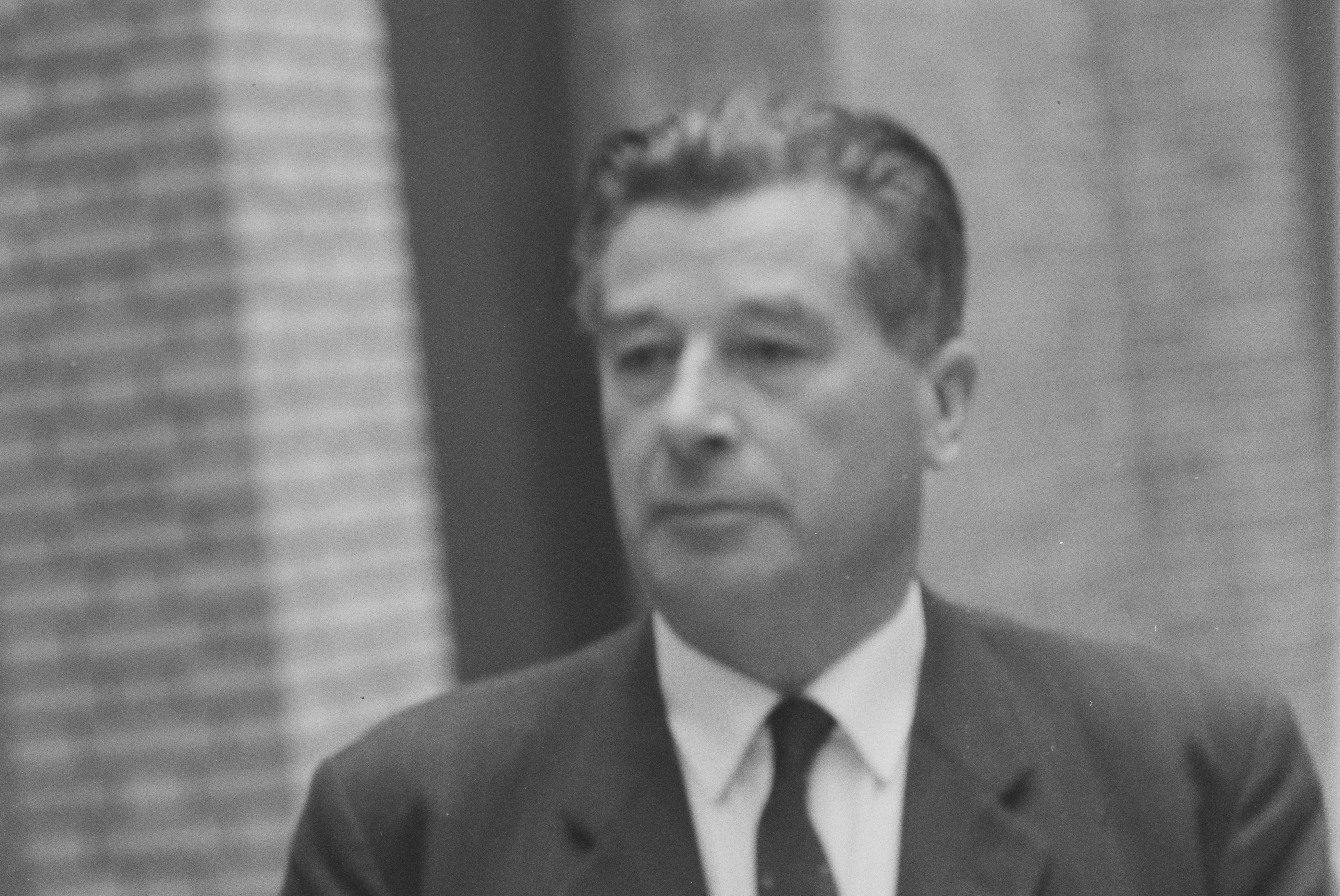 Bildet er hentet fra Arkivverket. Regjeringen Lyngs siste dag, fra debatten i Stortinget Arkivinstitusjon : Riksarkivet Arkivnavn : Billedbladet NÅ Sted : Norge, Oslo, Oslo, Stortinget Emneord: Regjeringer, Lyng Avbildet: Bernt Ingvaldsen